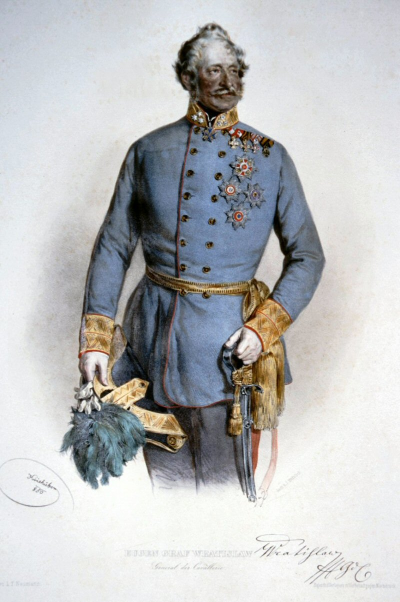 Eugen Wratislaw von Mitrowitz, Lithographie von Josef Kriehuber, 1850